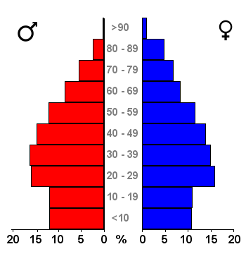 Age pyramids for the 443 municipalities in the Netherlands. Data 2007. Statistics provided by Centraal Bureau voor de Statistiek, Voorburg/Heerlen. Source: Tabel: Bevolking Nederland per gemeente en diverse regio's naar leeftijd, geslacht en burgerlijke staat, 1 januari 1988-2007. Gewijzigd op 24 mei 2007 (on-line database StatLine) Bevolkingspiramide - Gemeente Rotterdam (2007).png